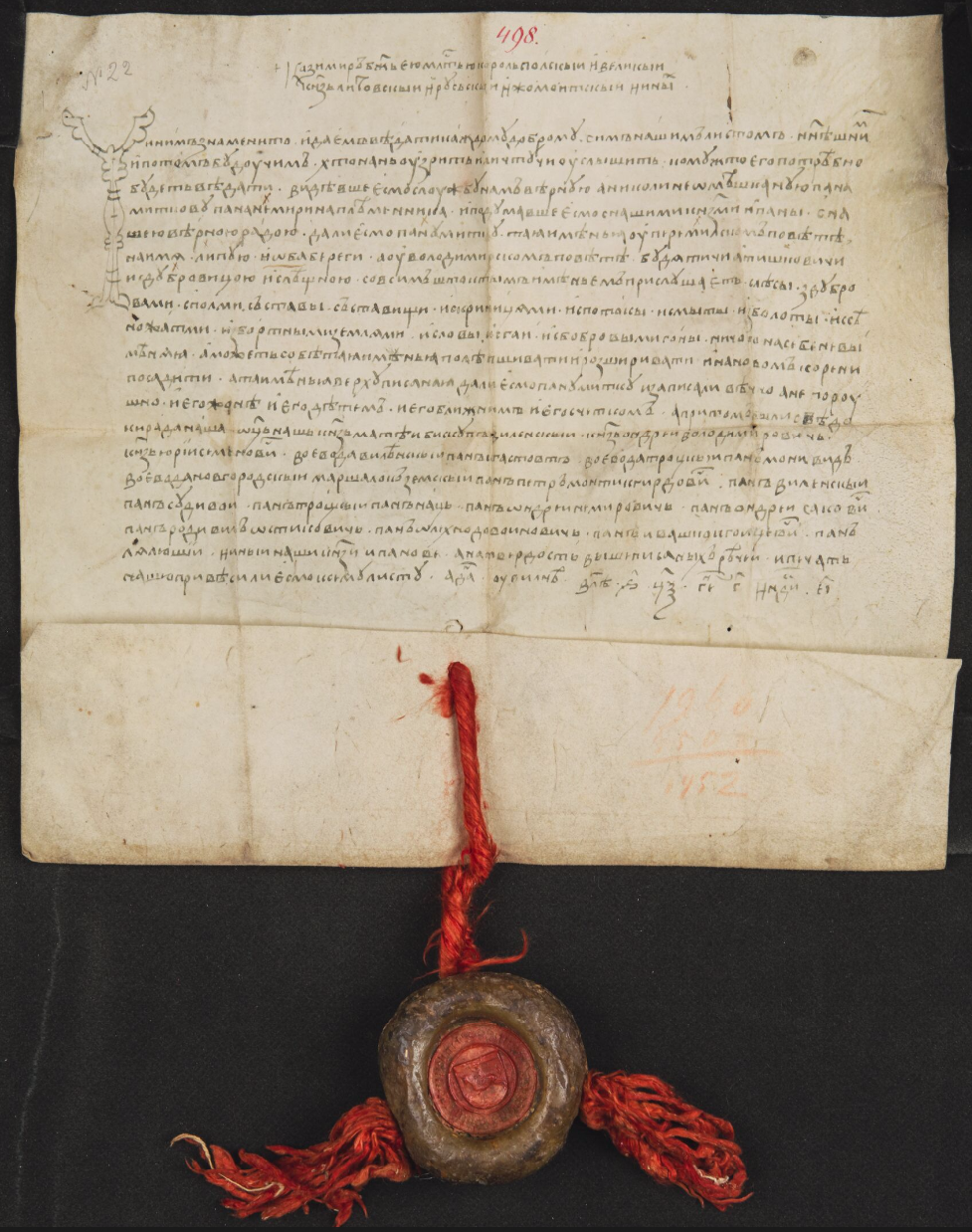 Подтвердительная грамота Казимира Ягайловича Митку Немире на имения, пожалованные ему от Швидригайла: на село Липу в Перемыльском повете и на села Бутятичи, Тышковичи, Дубровец, Лешняя во Владимирском повете. 1452 года. Января 3 дня. [Kazimierz król polski, wielki książę litewski nadaje dziedzicznie panu Mitkowi krewnemu pana Niemiry, w nagrodę za wierną służbę, wieś Lipę i oba brzegi (stawu) w powiecie przemyskim oraz wsie: Budiaticze, Tyszkowicze, Dąbrowicę i Lisznię w powiecie włodzimierskim] (Fundacja XX Czartoryskich. 498 Perg.)